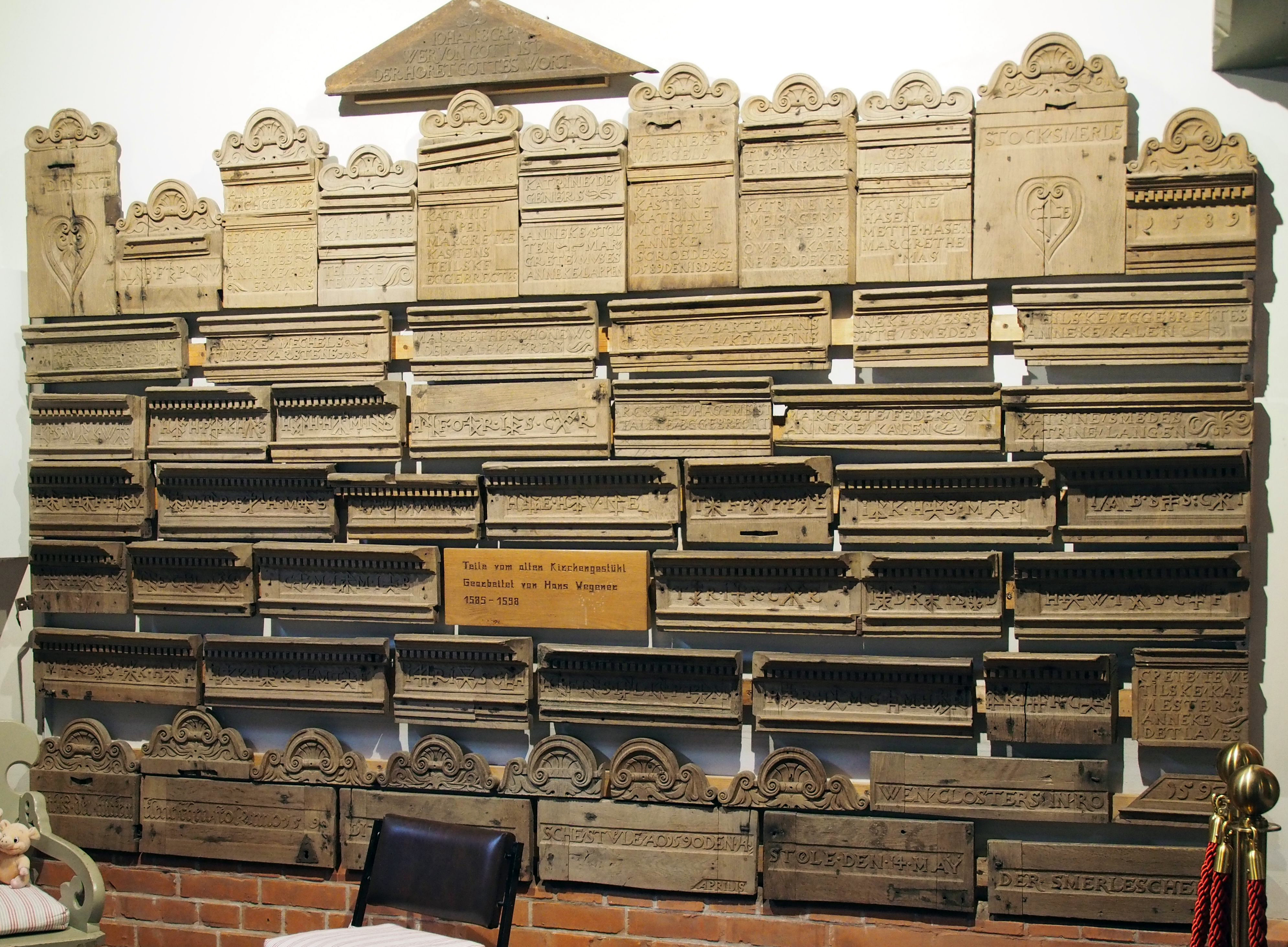 Warnemünder Hausmarken in der Warnemünder Kirche, 1585–1598 erstellt vom Schnitzer Hans Wegener, Teil des Gestühls der 1874 abgebrochenen Kirche.